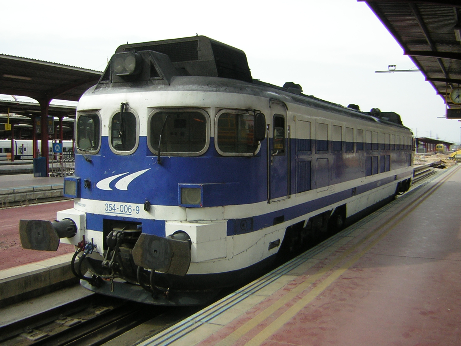 Locomotora Talgo 354-006, "Virgen de Aránzazu" apartada en Madrid Chamartín.